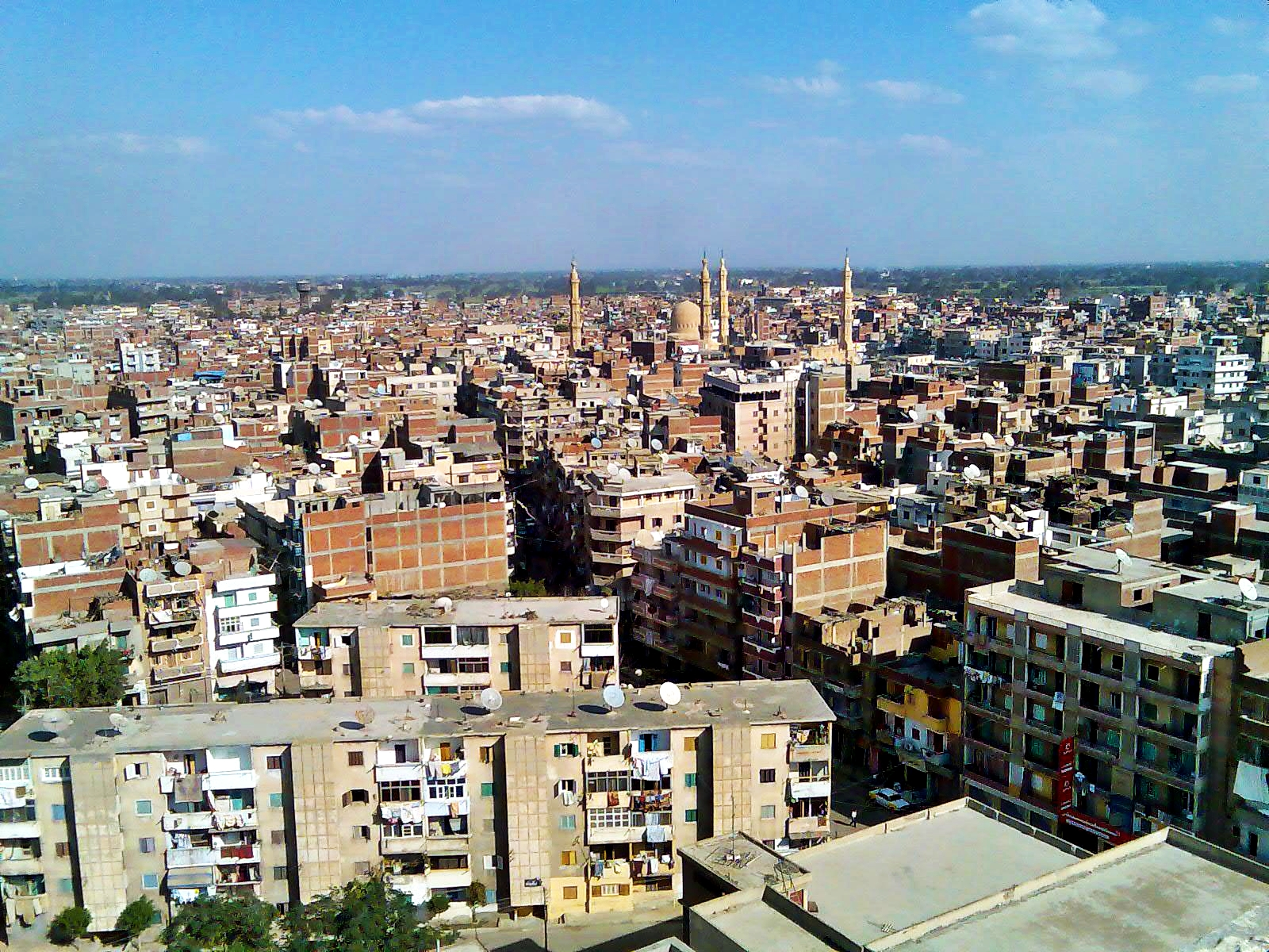 وسط مدينة دسوق